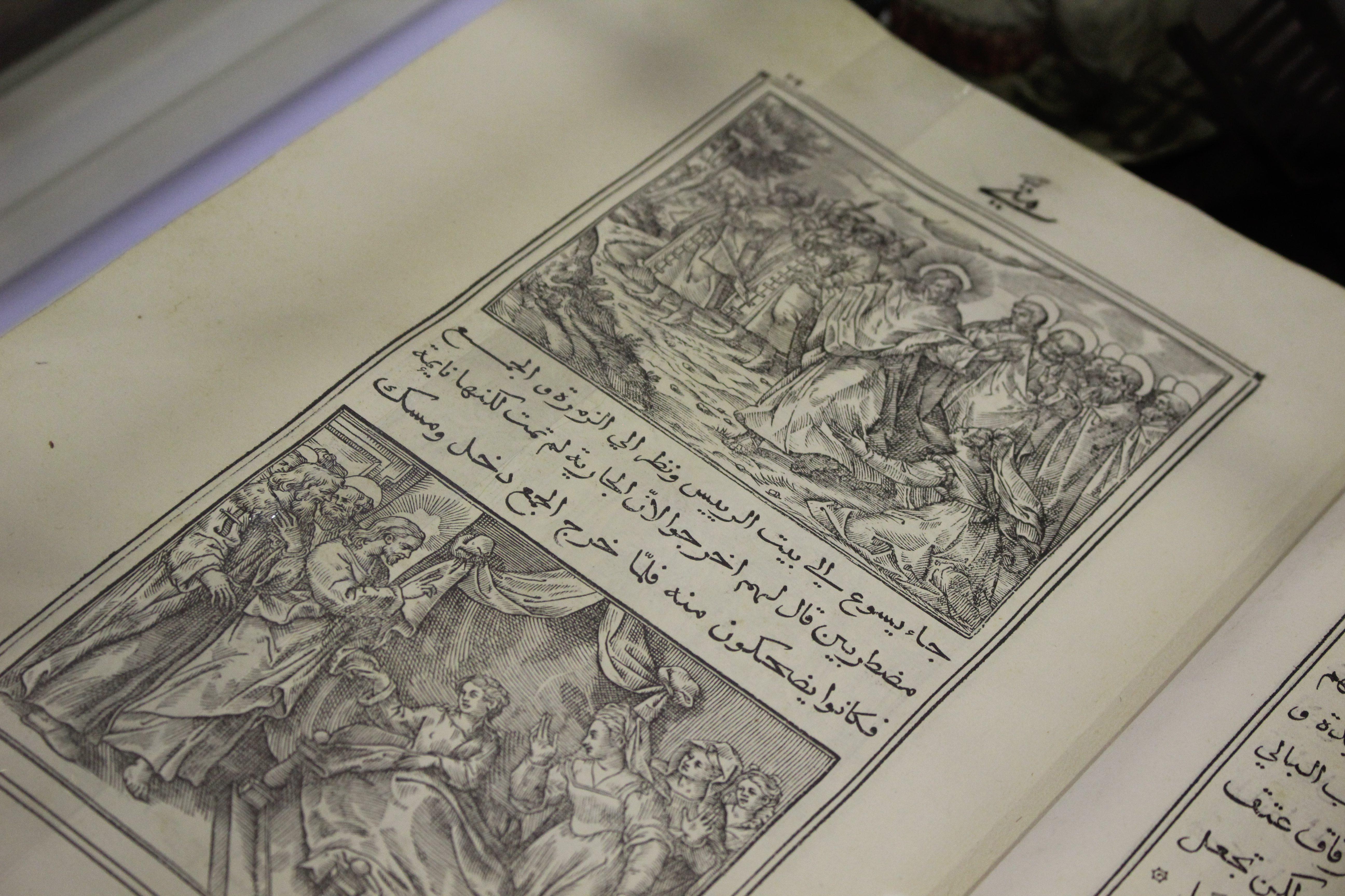 Biblia Arabica, 1590-1591 - Foire du Livre de Charjah